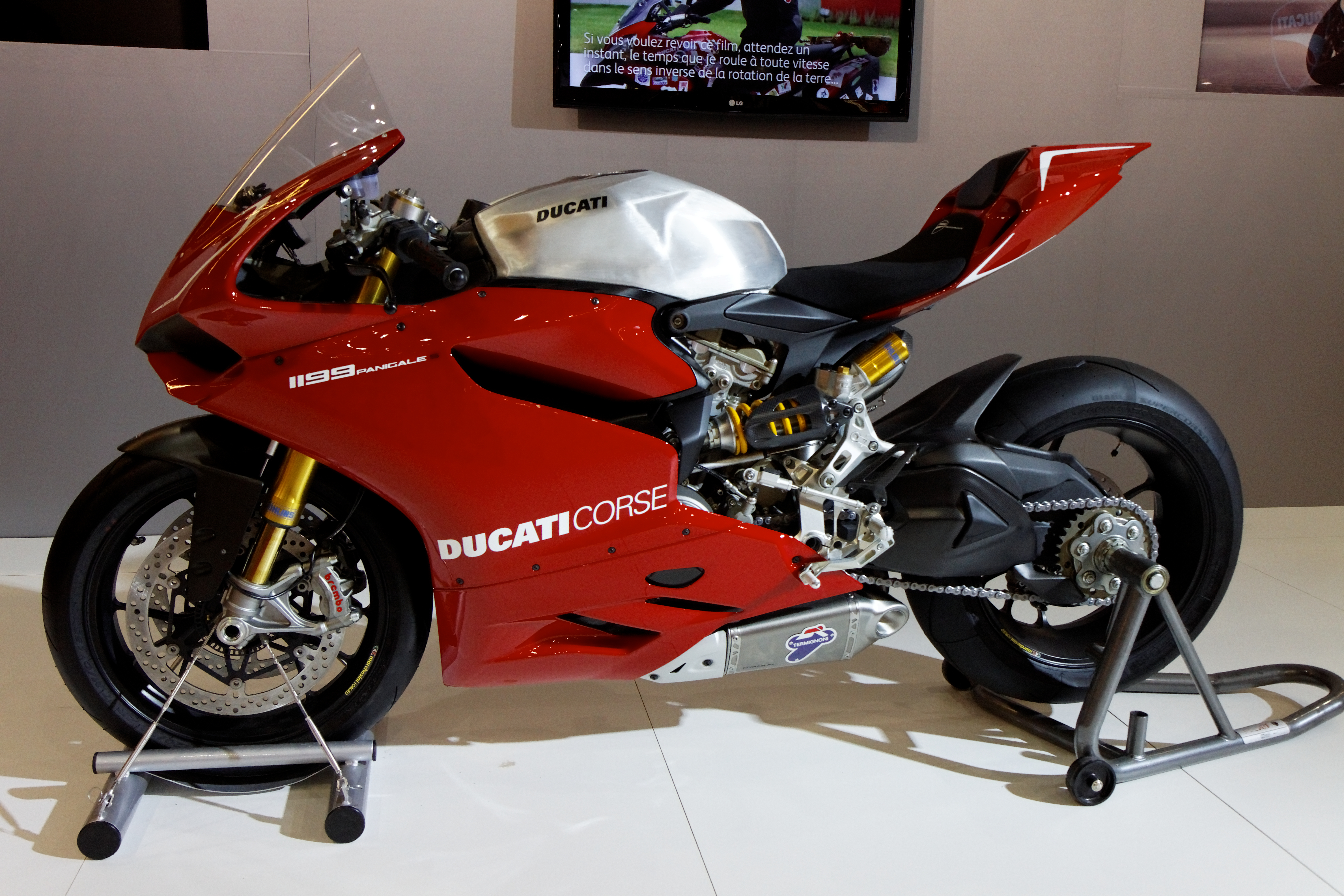 Ducati - 1199 Panigale S